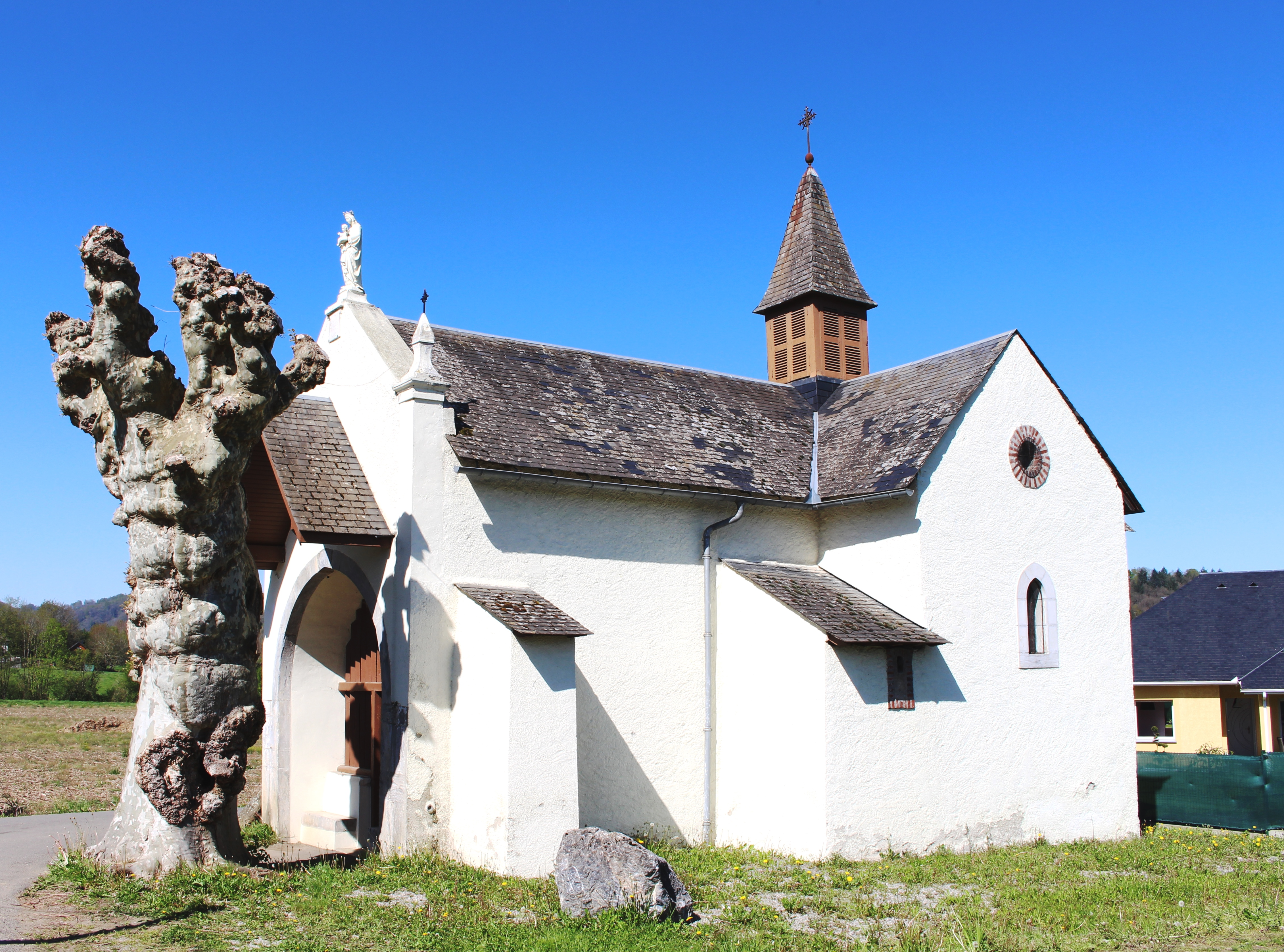 Chapelle Notre-Dame-de-la-Hourcadère de Trébons (Hautes-Pyrénées)